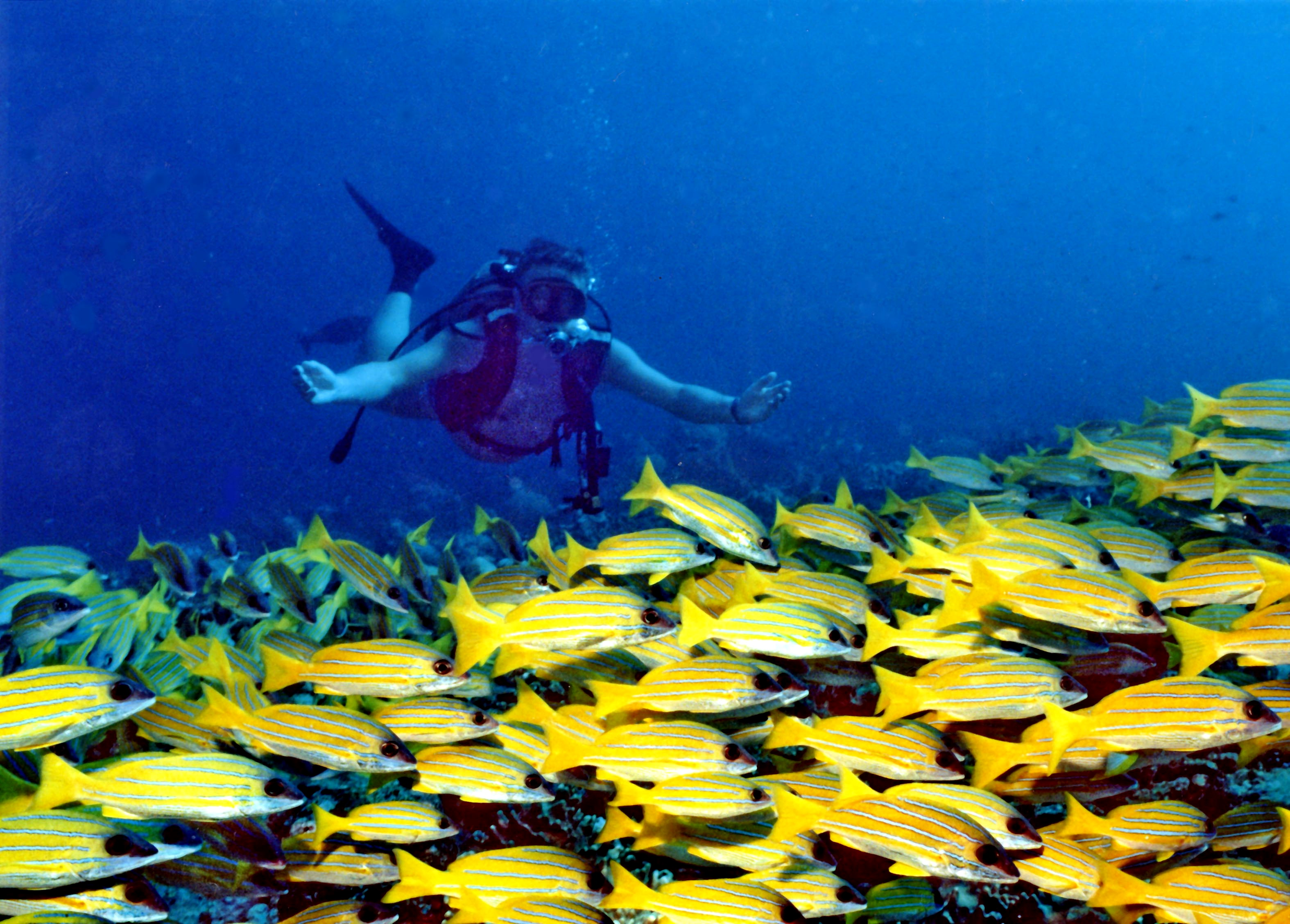 Banc de gatterins sur Banann Reef (Maldives)